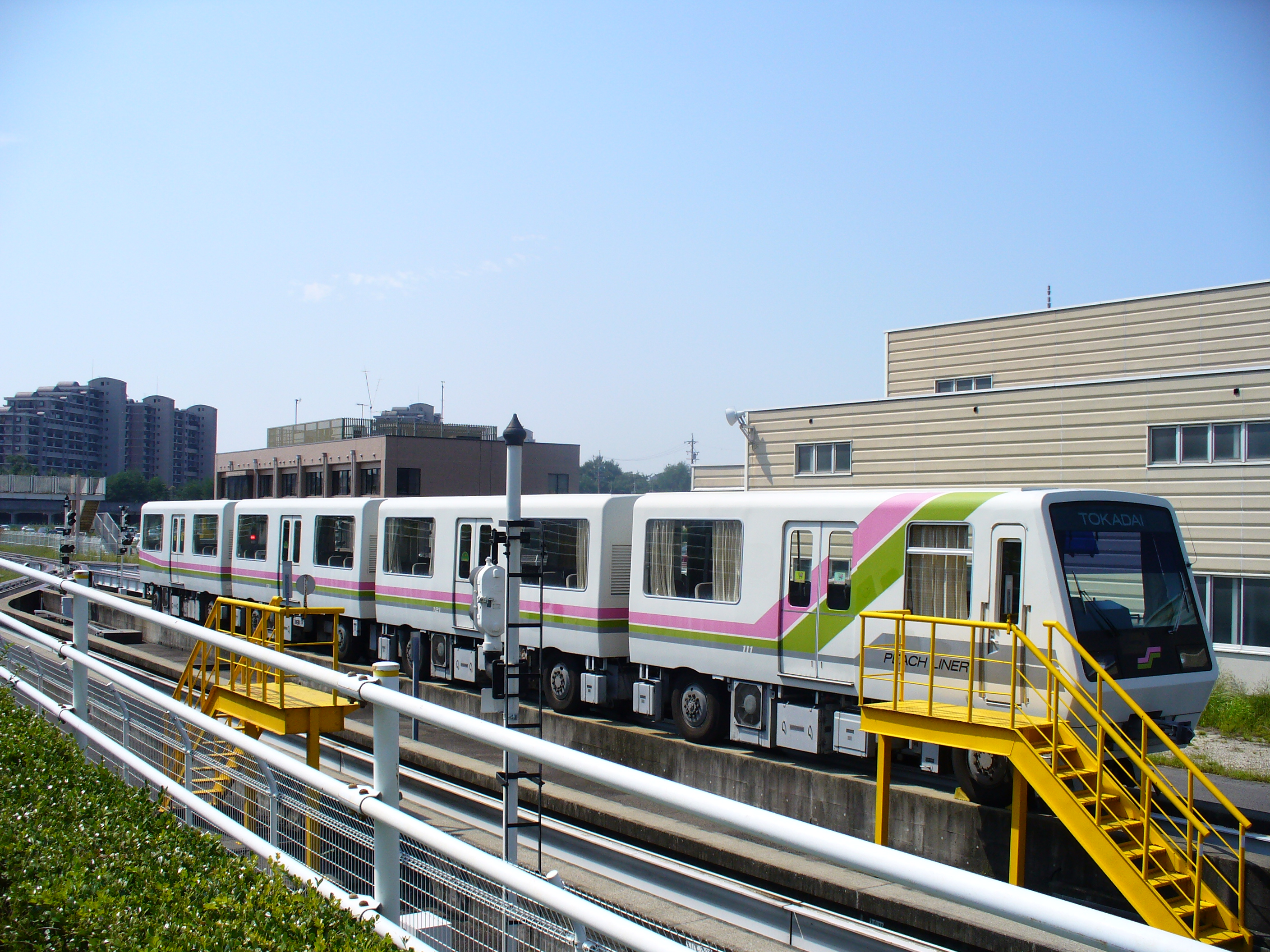 Photograph of Peachliner_100kei ,taken in Komaki city, Komaki, Japan.